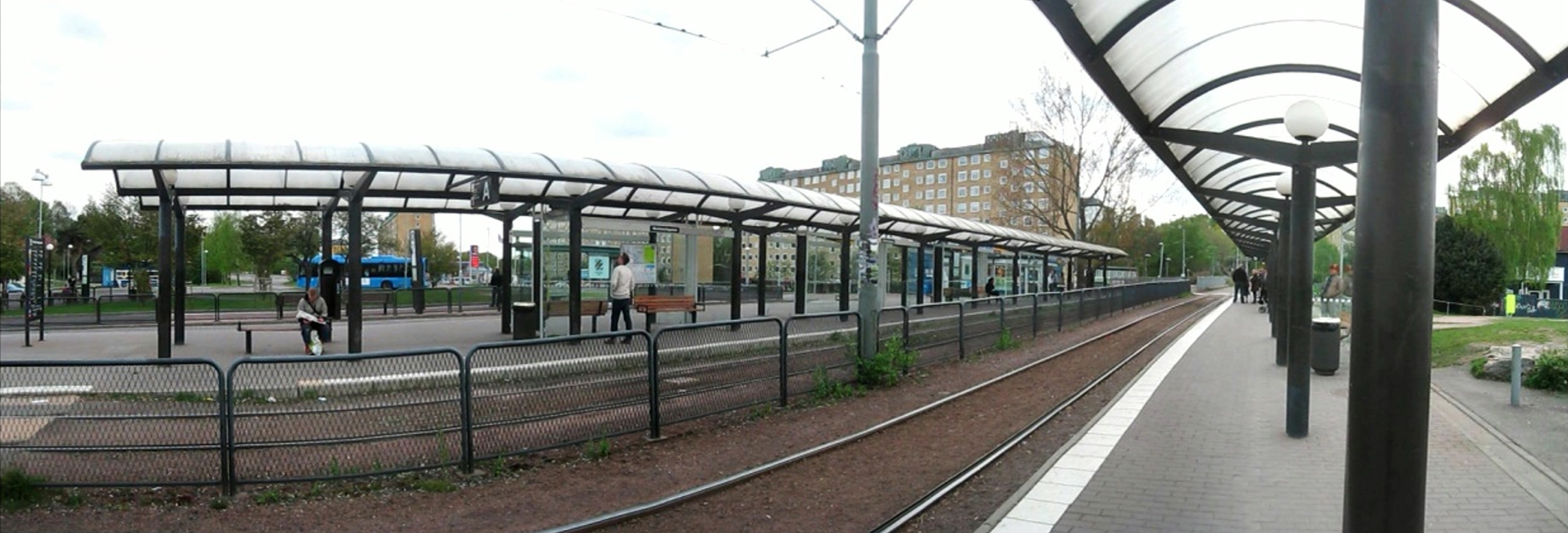 Panoramabild över spårvagnhållplatsen Marklandsgatan i Göteborg.